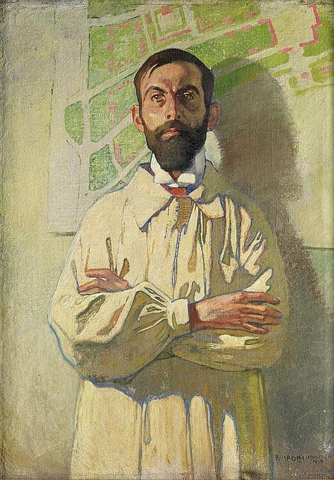 Self-portrait